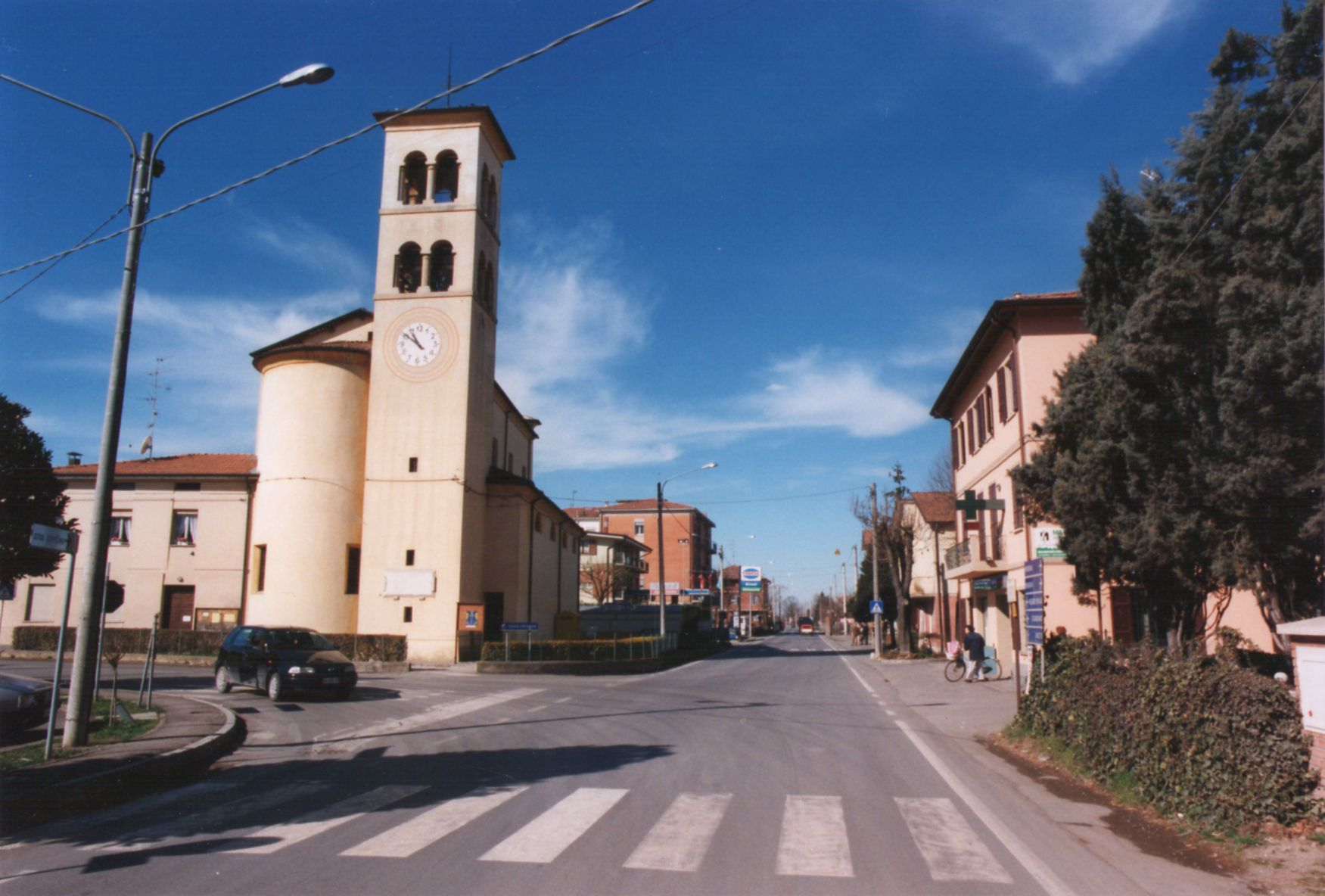 Salvaterra, frazione di Casalgrande: vista sull'abside della Chiesa Parrocchiale del Santissimo Salvatore risalente al XVI secolo e eretta sulle fondazioni dell'antica cappella che esisteva all'interno delle mura del castello.